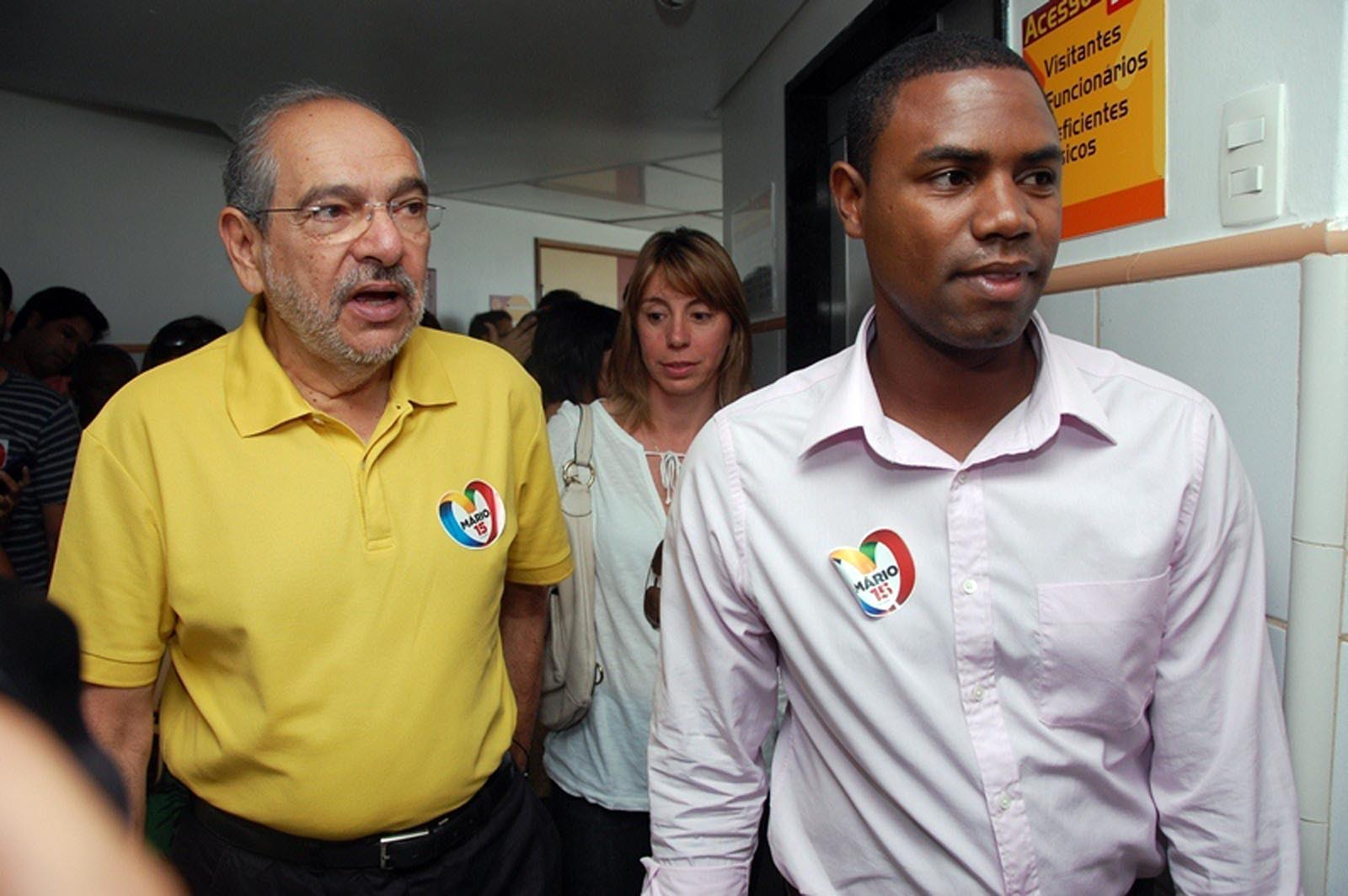 Foto: Ag haack/Bahia notÍCias